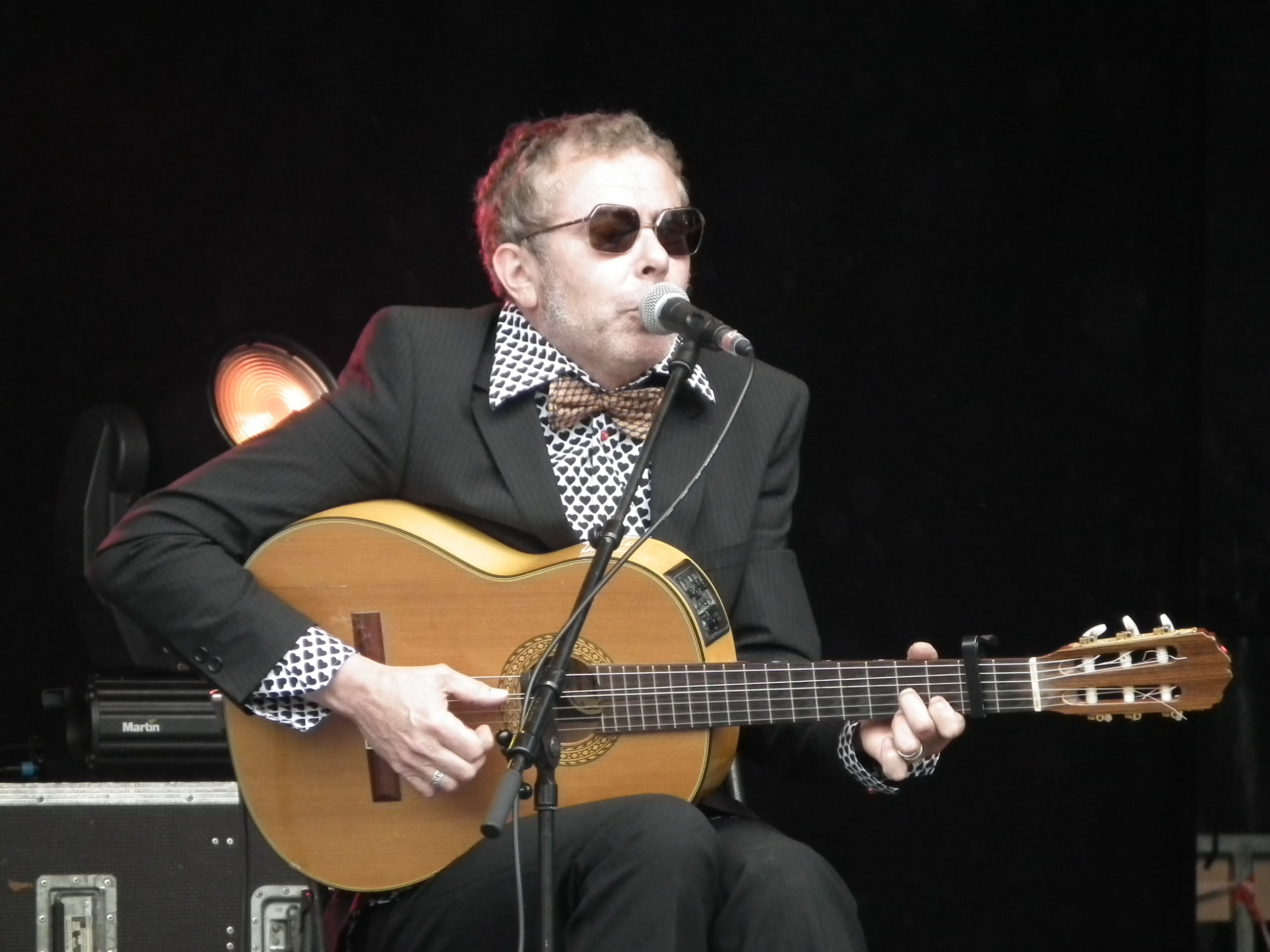 Pascal Parisot au festival Clayescibels, juin 2013